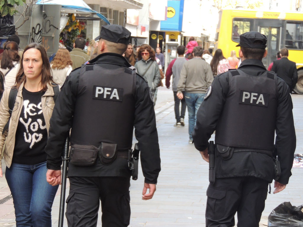 Efectivos de la Policía Federal Argentina (PFA) patrullando una de las peatonales de la ciudad de Rosario